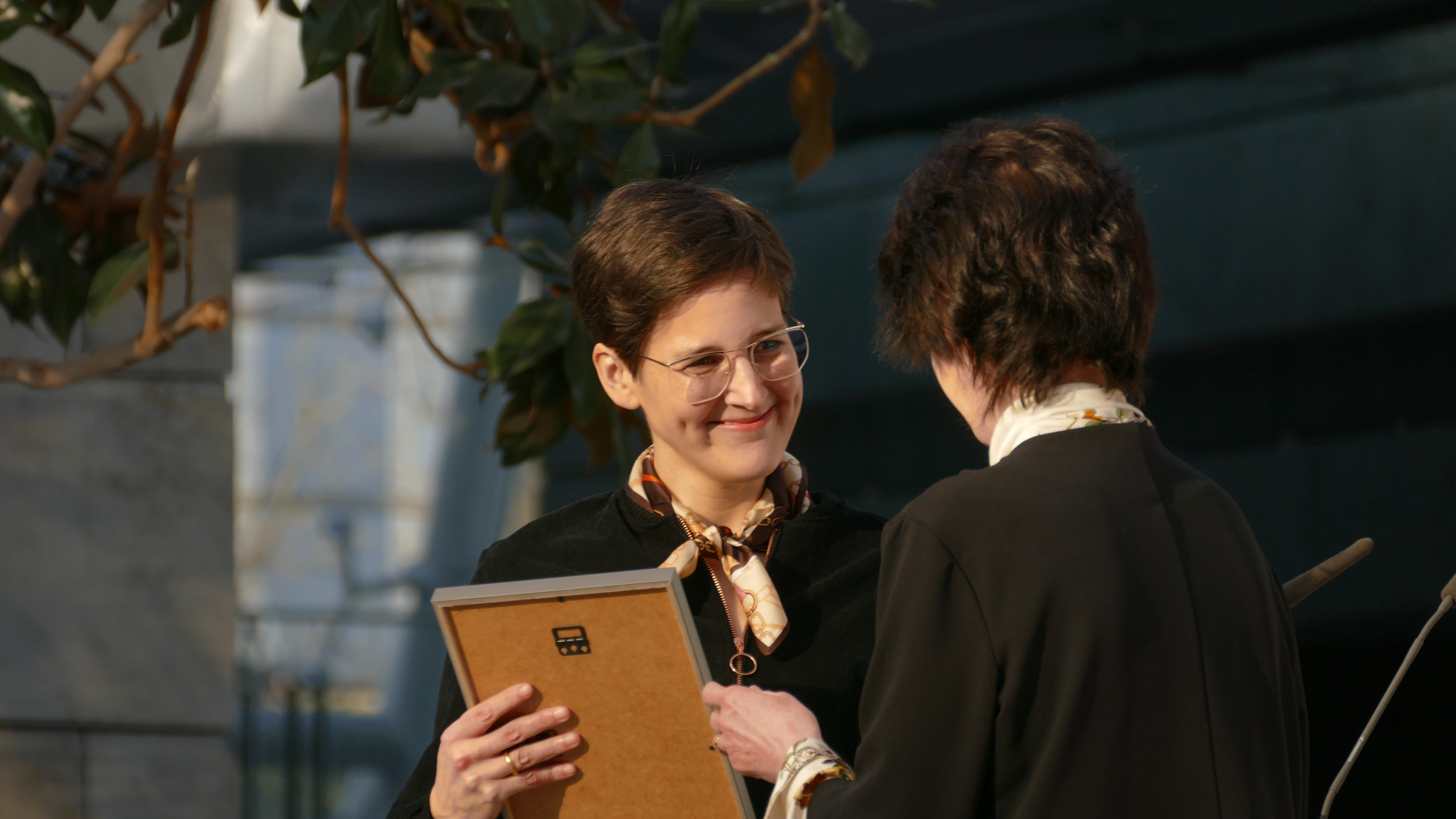 Anke Stelling erhält den Preis der Leipziger Buchmesse 2019, Kategorie Belletristik für ihren Roman "Schäfchen im Trockenen". Er wird überreicht von Eva-Maria Stange, Staatsministerin für Wissenschaft und Kunst des Freistaates Sachsen